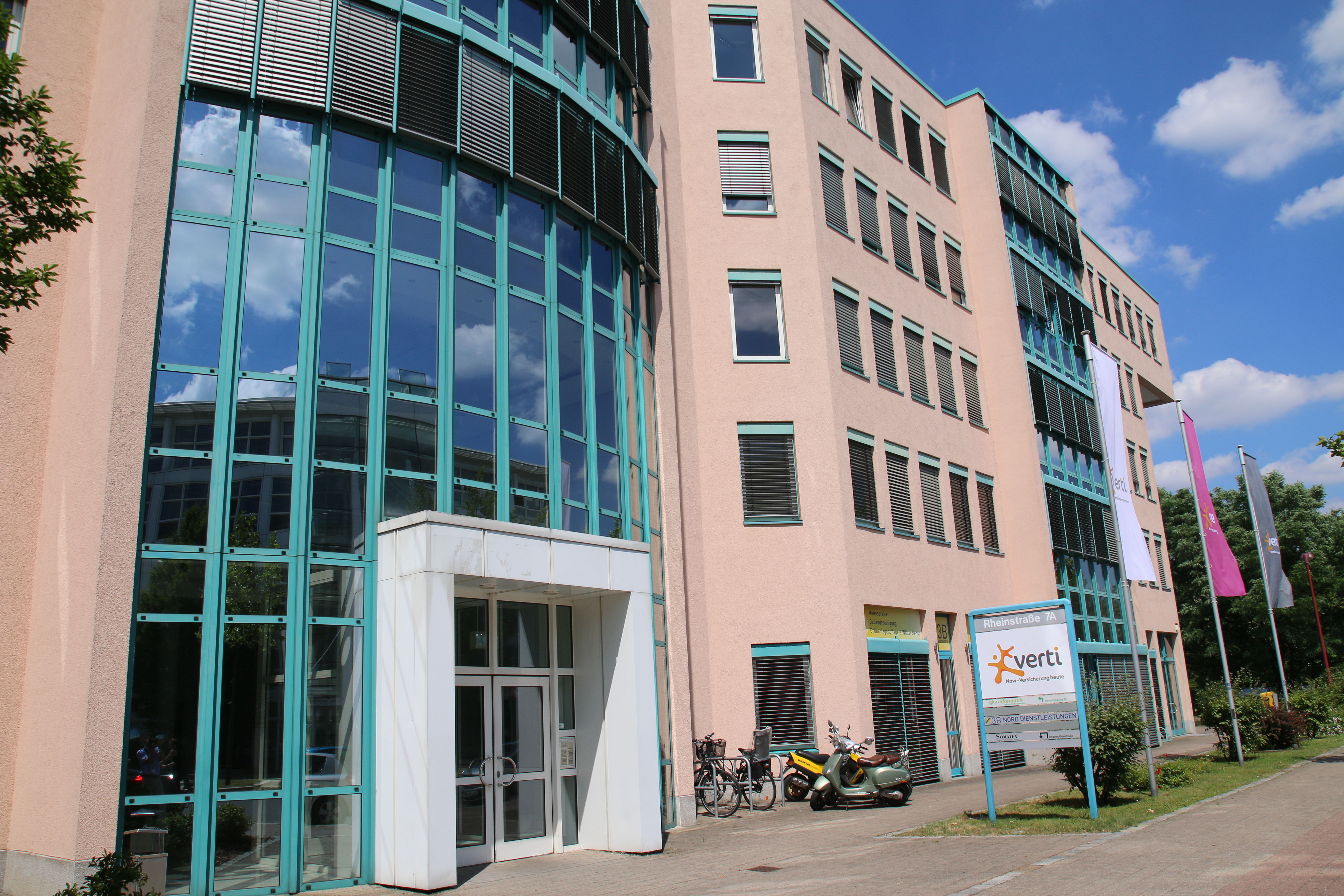 Dies ist der Haupteingang der Verti Versicherungs AG in Teltow bei Berlin